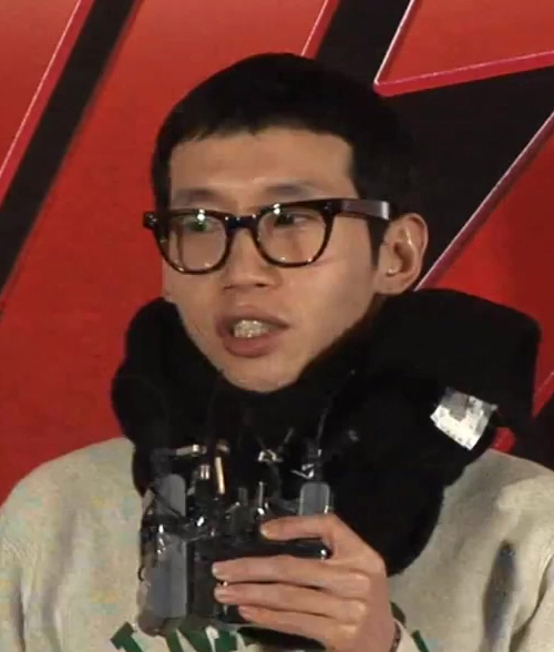 (캐치미) VIP 시사회 현장 공개